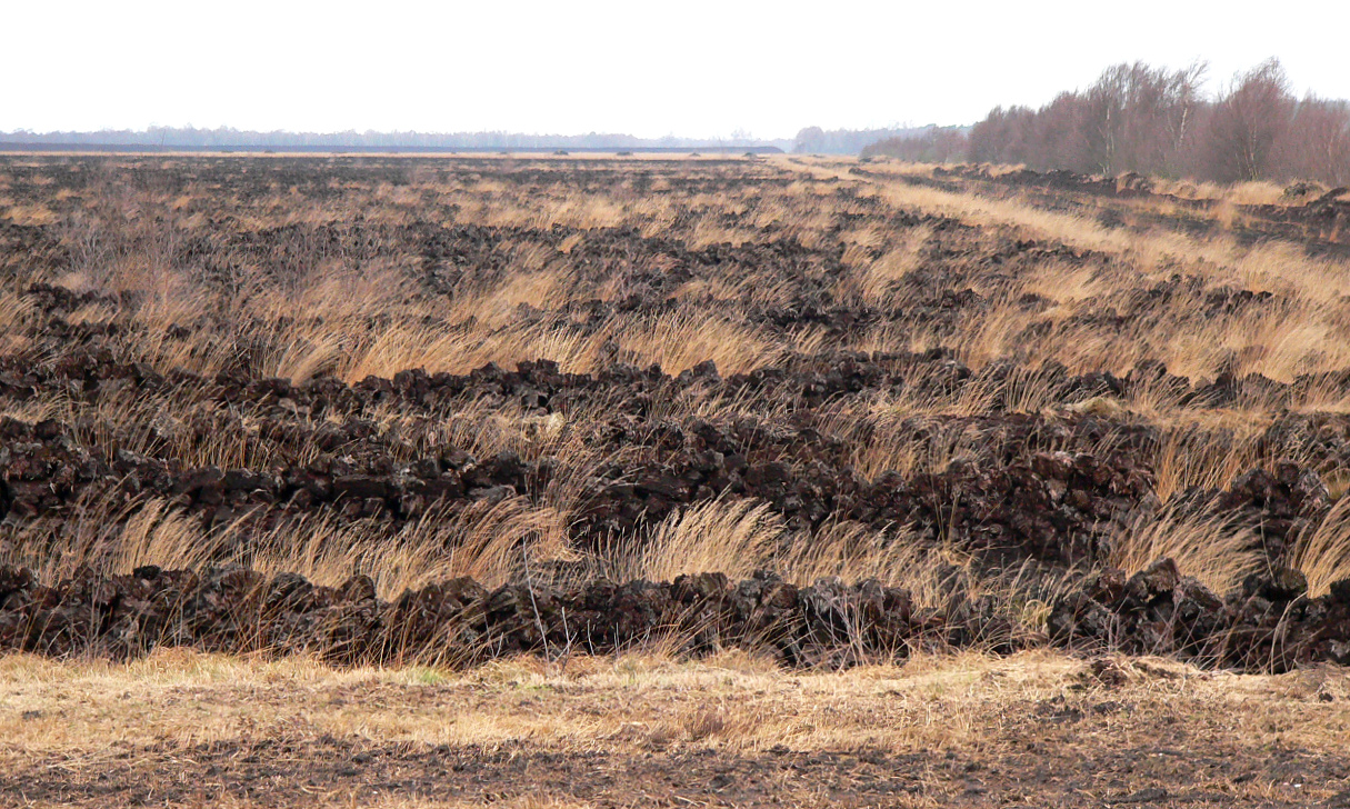 Ungefähre Fundstelle vom Mädchen aus dem Uchter Moor